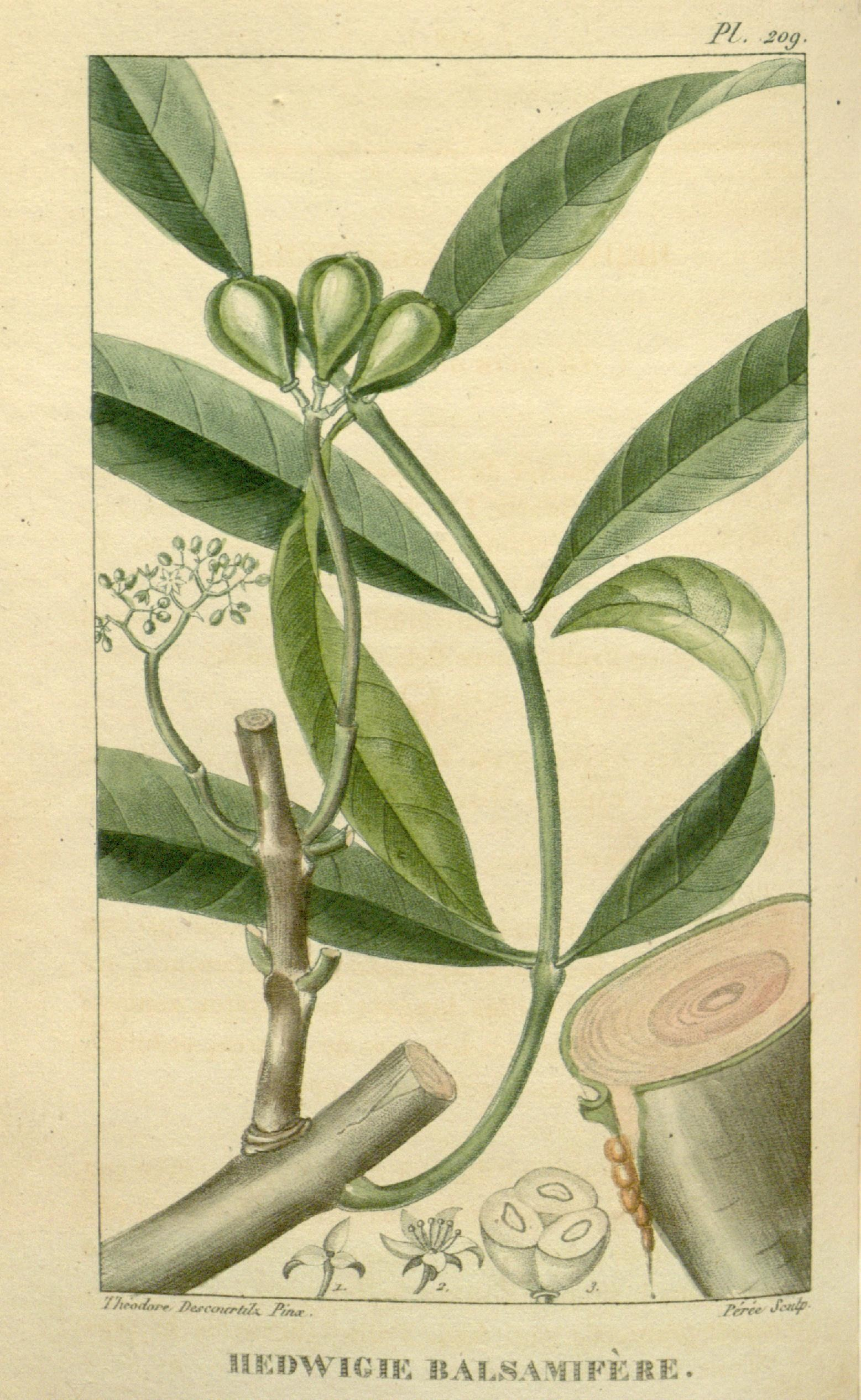 //. £o^. JSi:i)WlGIK BAî.SAMlFÈRE .